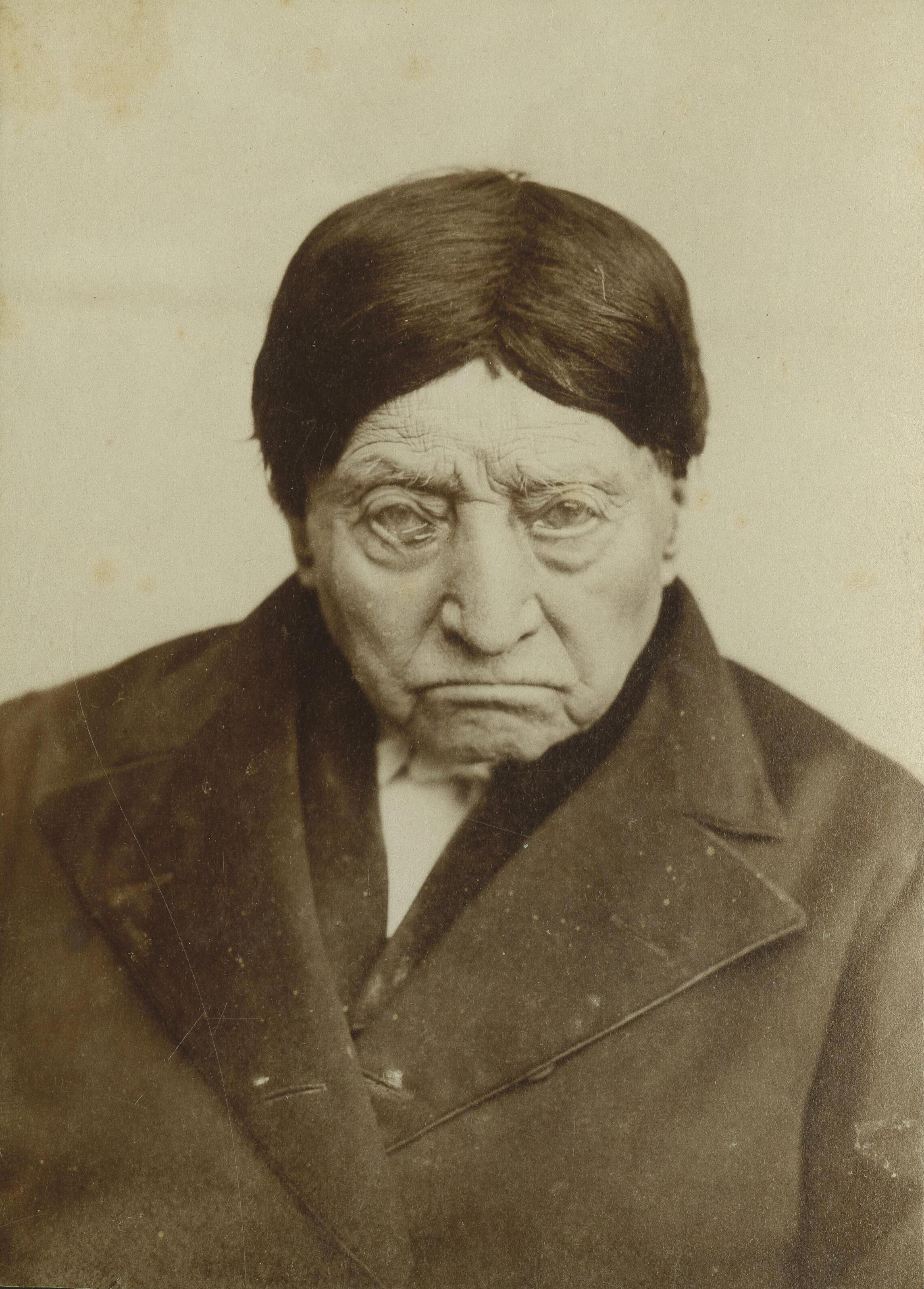 Geert Adriaans Boomgaard op 100-jarige leeftijd, vastgelegd door J.G. Kramer